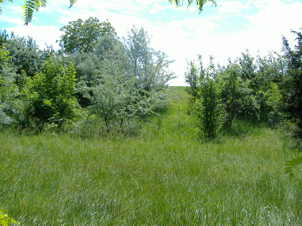 A Pozderka-halom Törökszentmiklós mellett (a fák között)